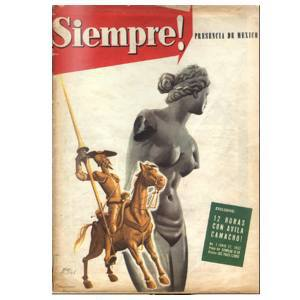 Primer ejemplar de la Revista Siempre!